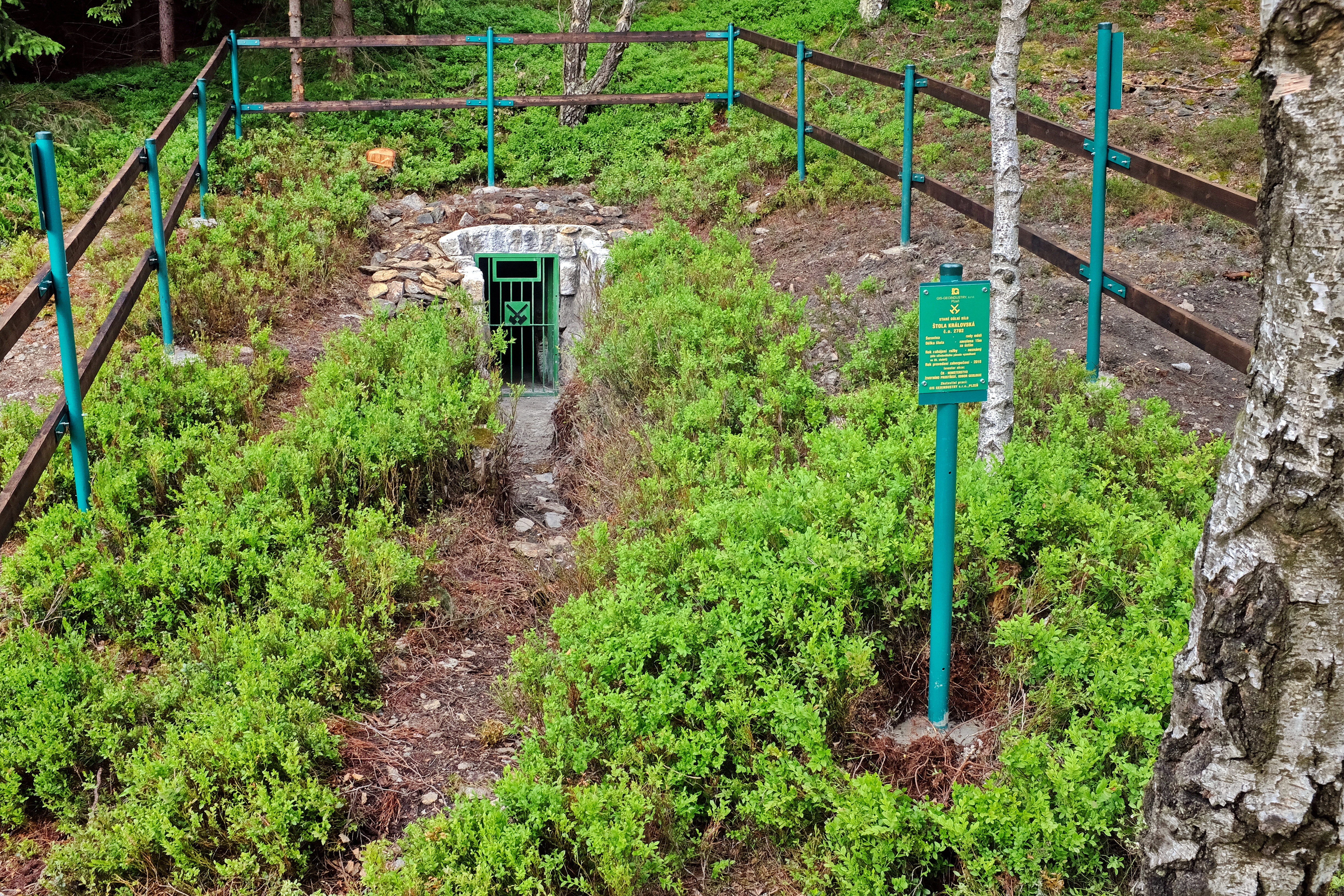 Evropsky významná lokalita Tisovec na jihozápadním svahu vrchu Tisovec, nad Tisovou, místní částí obce Kraslice, ústí Královské štoly, okres Sokolov